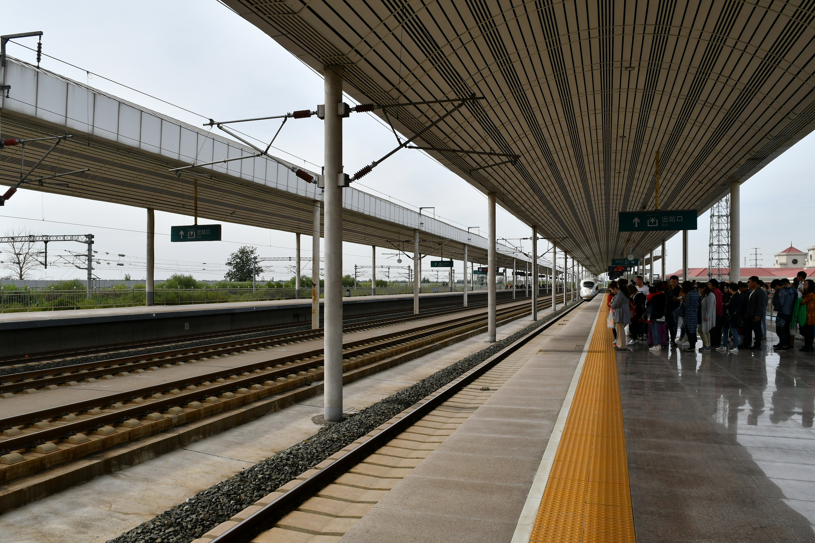 武清车站站台，去往天津方向城际列车进站。